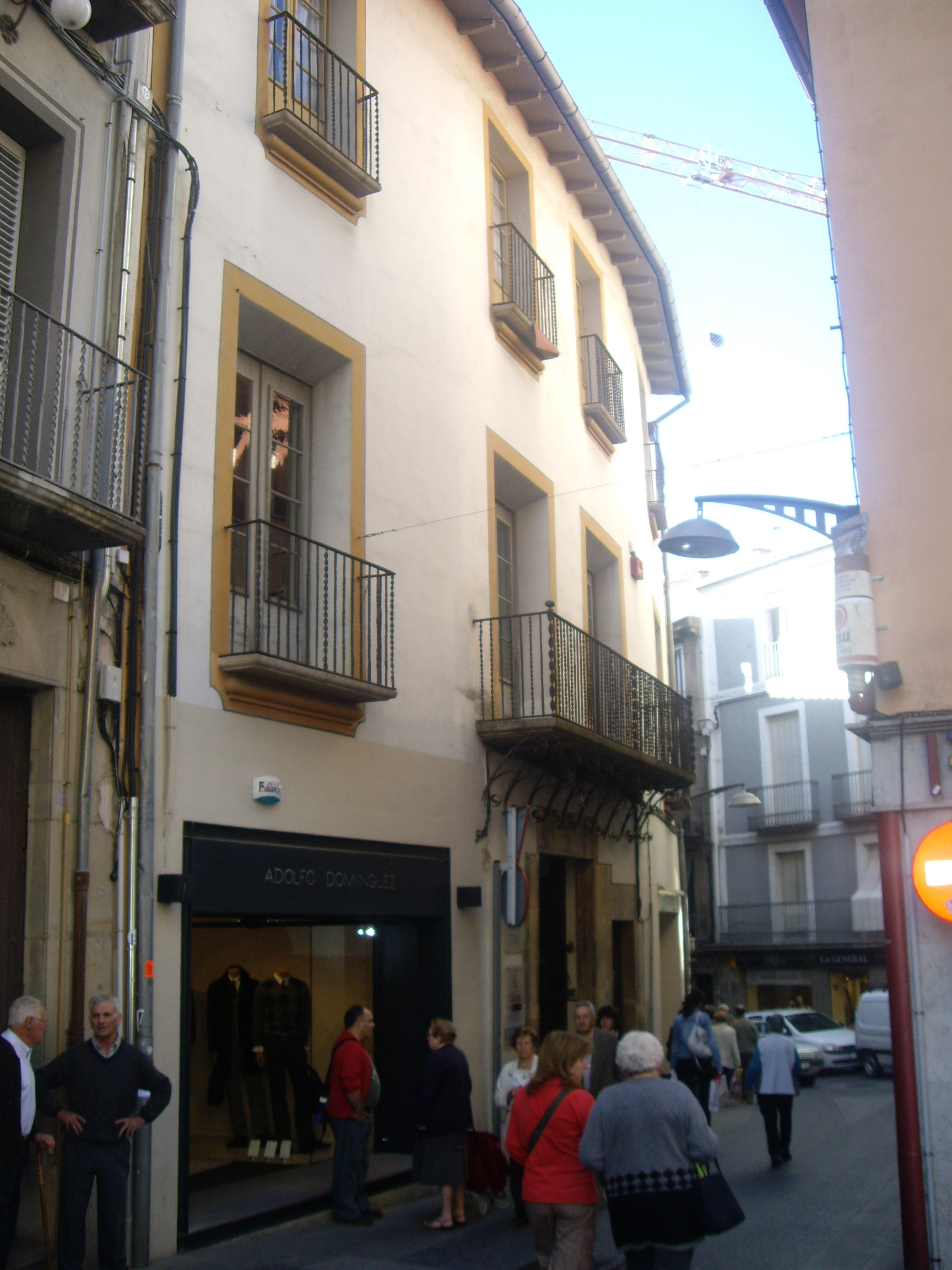 Carrer Sant Rafel 29, Olot